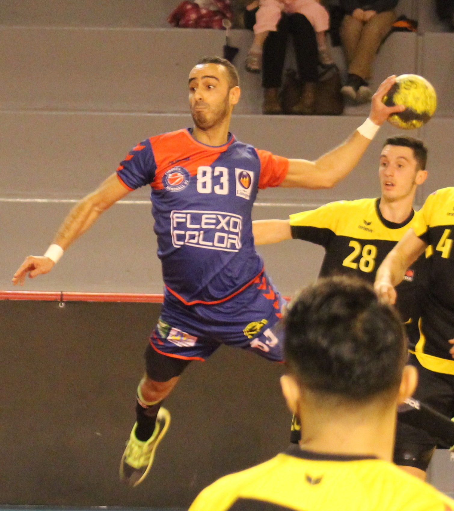 Championnat de France de handball masculin de Nationale 1, Villeurbanne HA vs Limoges Hand 87, dans la salle des Gratte-Ciel à Villeurbanne. Score final : VHA - Limoges : 25 - 37.